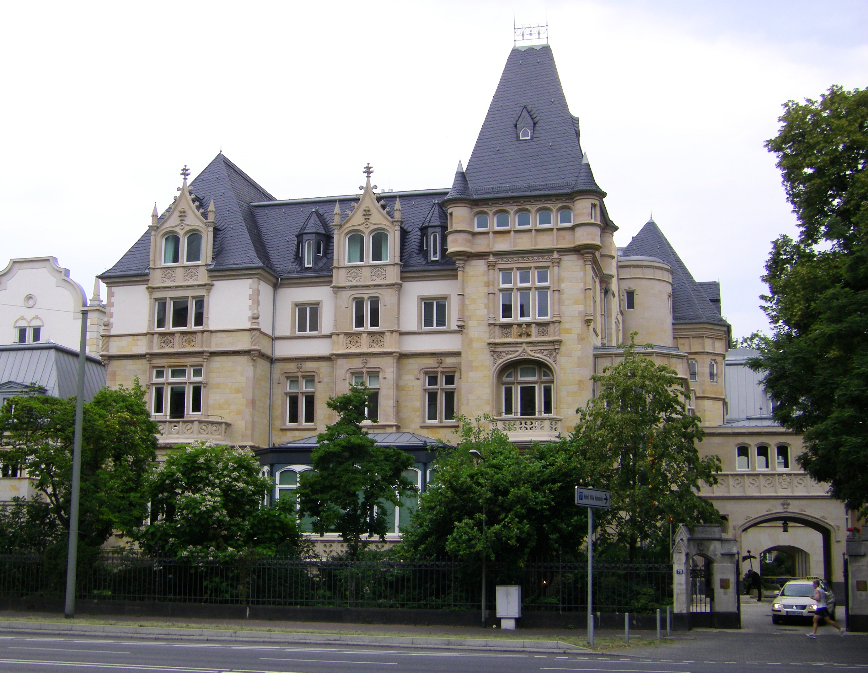 Hotel in Frankfurt-Sachsenhausen (ehem. Villa Speyer)